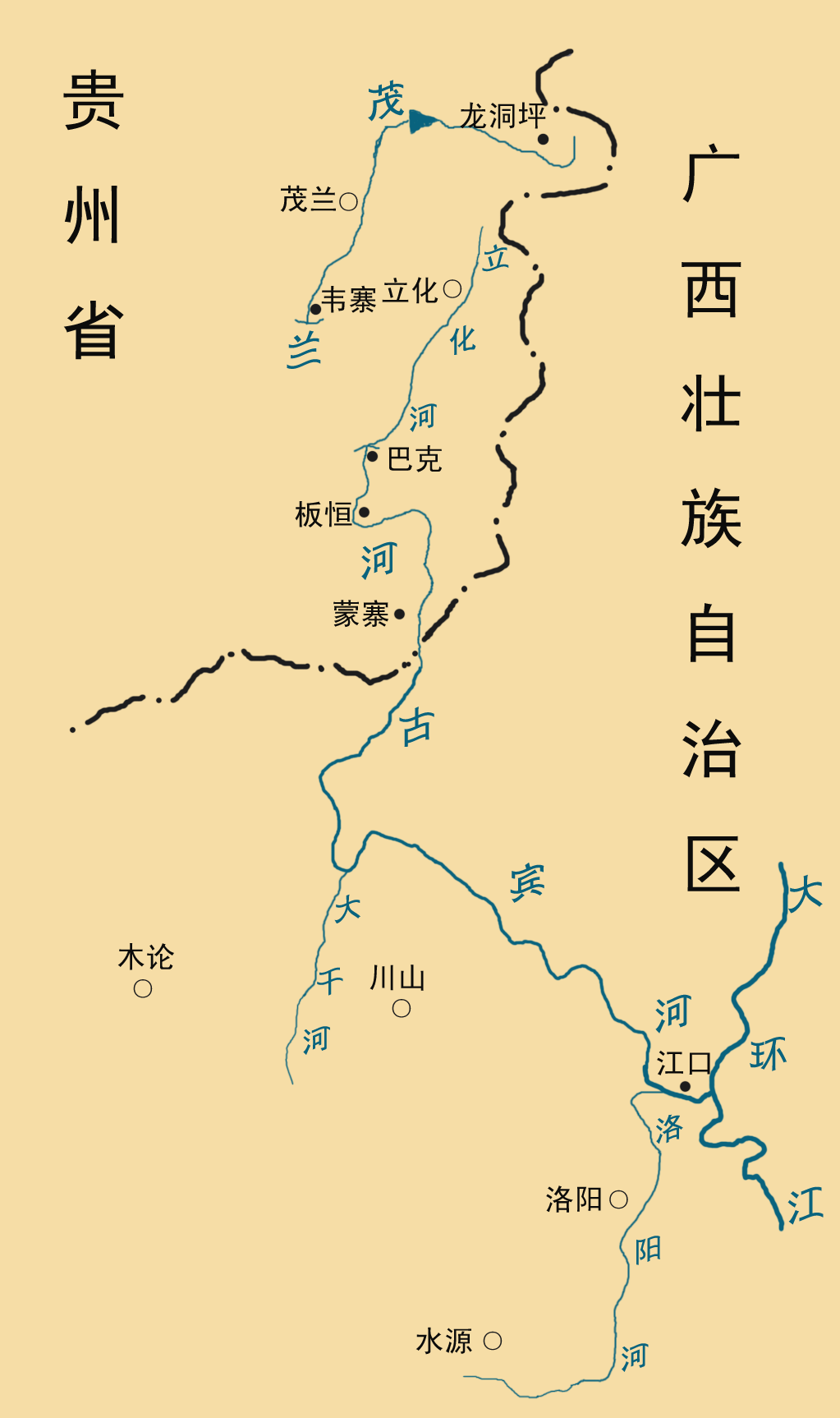 中国贵州省和广西壮族自治区之间的古宾河流域图。数据来自《中国河湖大典 珠江卷》。